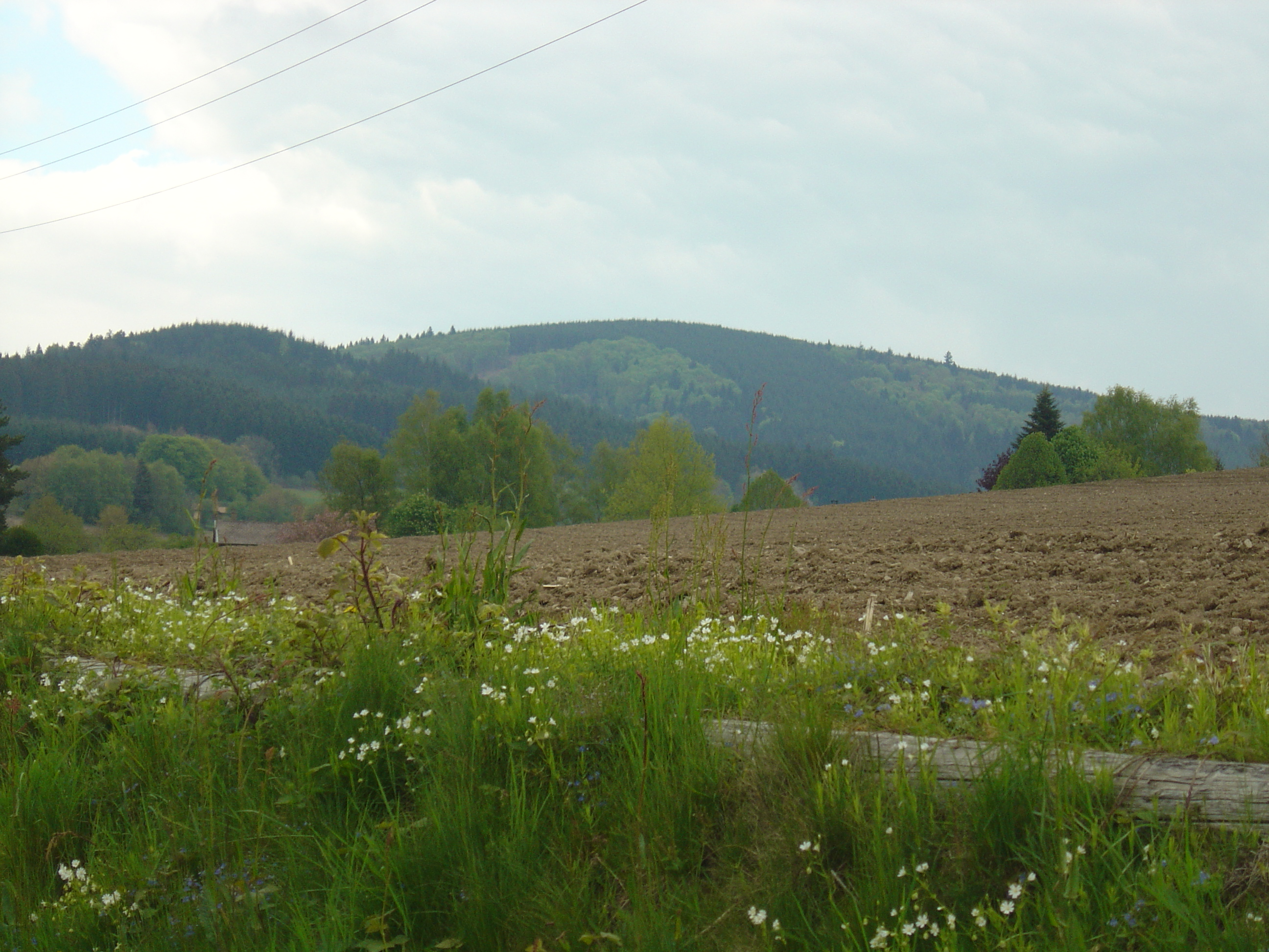 Prise de vue à proximité de Chénelette. Est-ce le mont Saint-Rigaud (1009m) ou le mont Monnet (1000m) ?